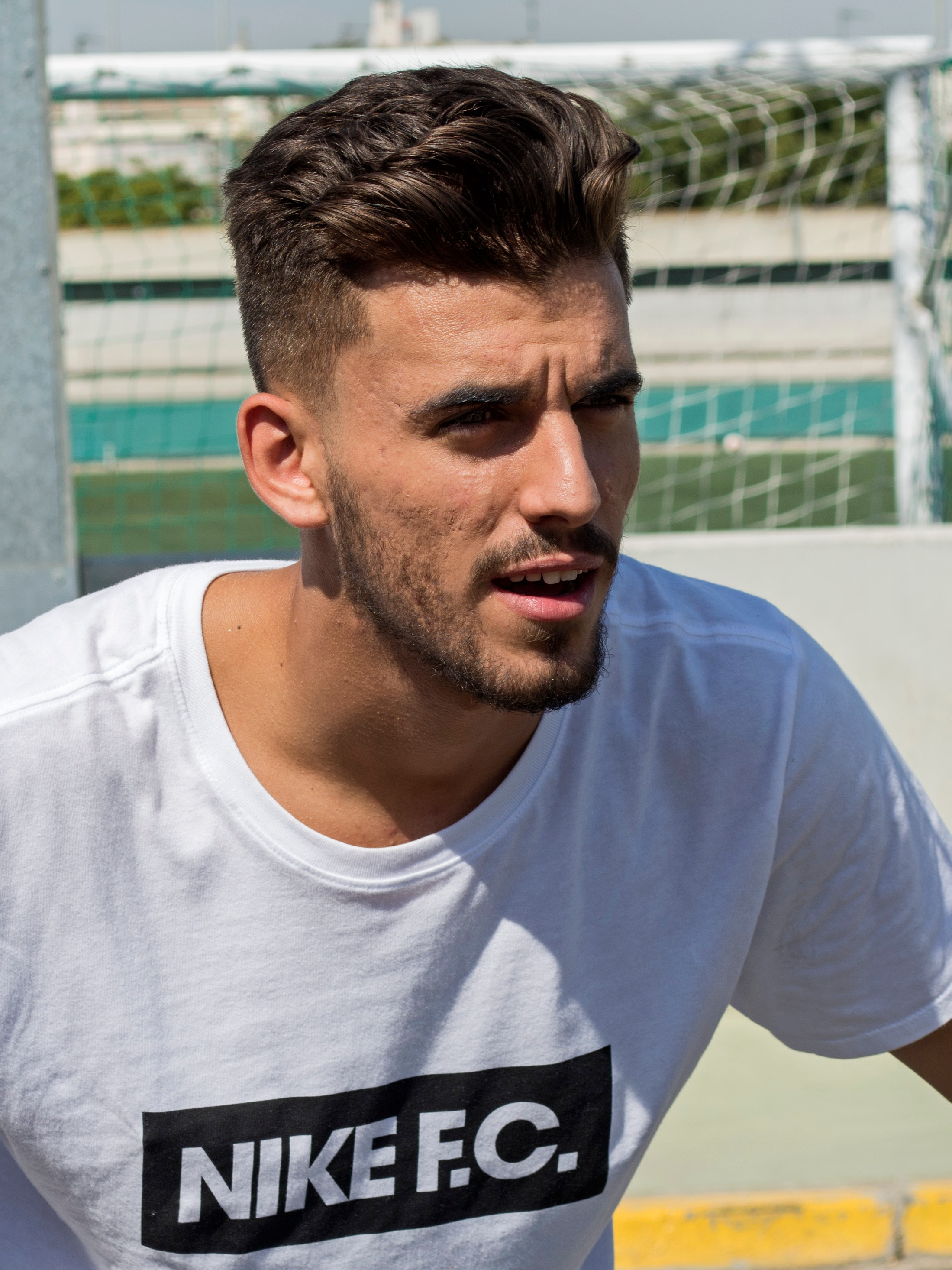 Dani Ceballos, futbolista del Real Betis. Ciudad deportiva Luis del Sol